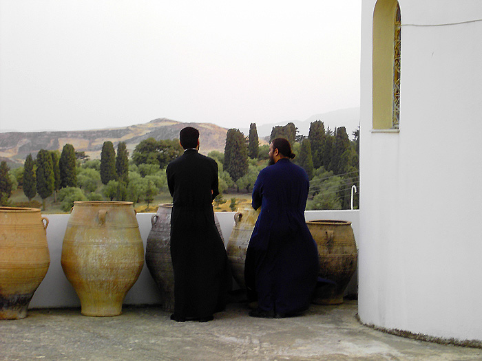 Moni Agios Georgios Epanosifis